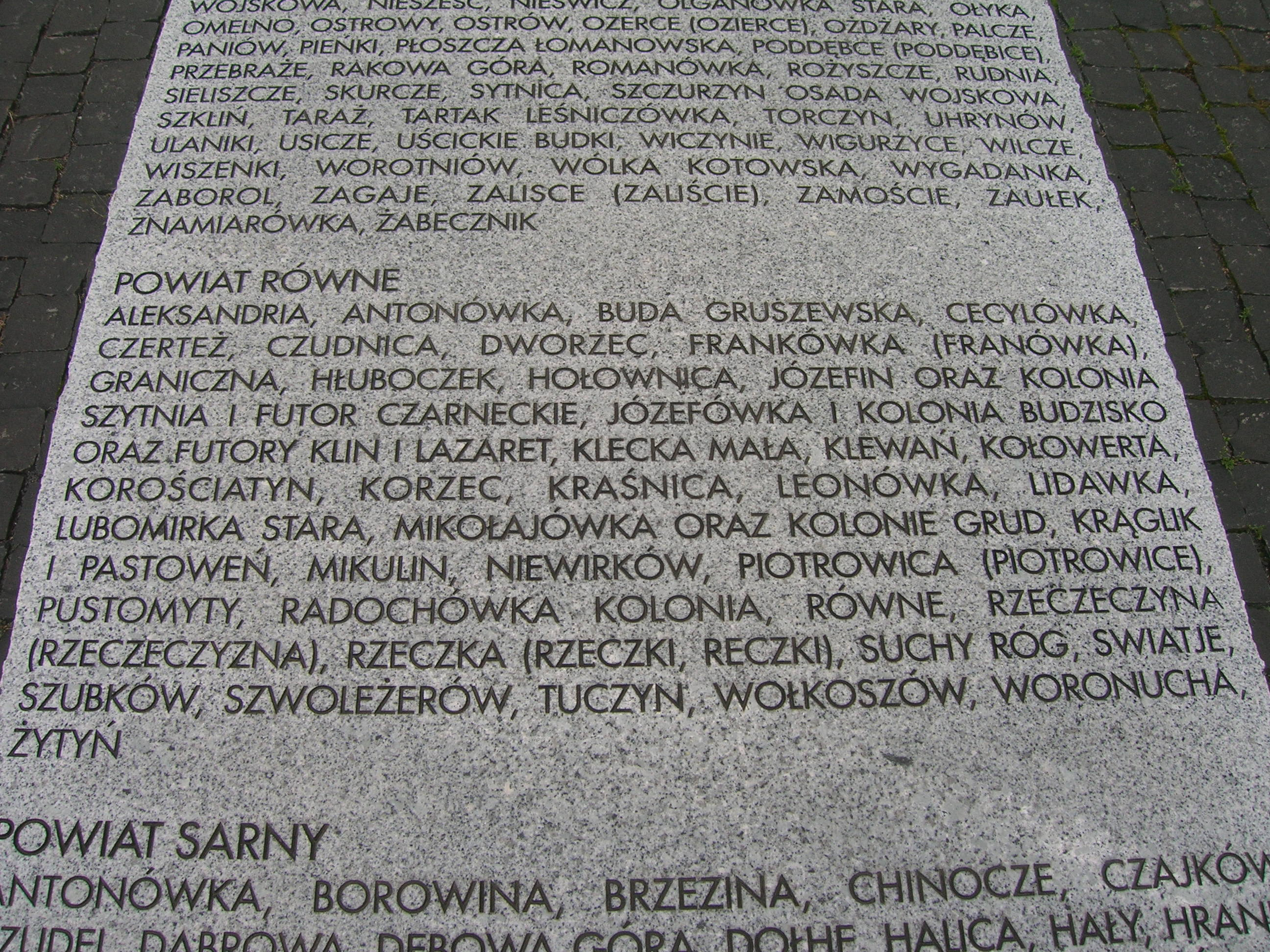 tablica powiat Równe